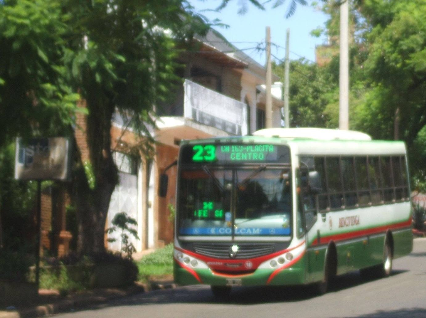 Bus de transporte local